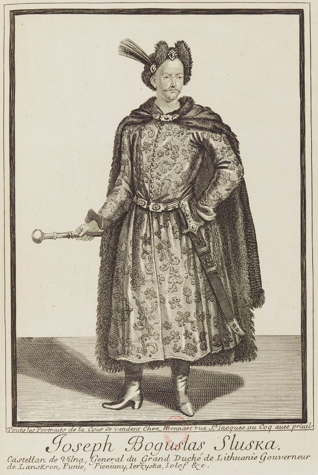 Беларуская (тарашкевіца): Партрэт Юзэфа Багуслава Слушкі (Juzef Bahusłaŭ Słuška)